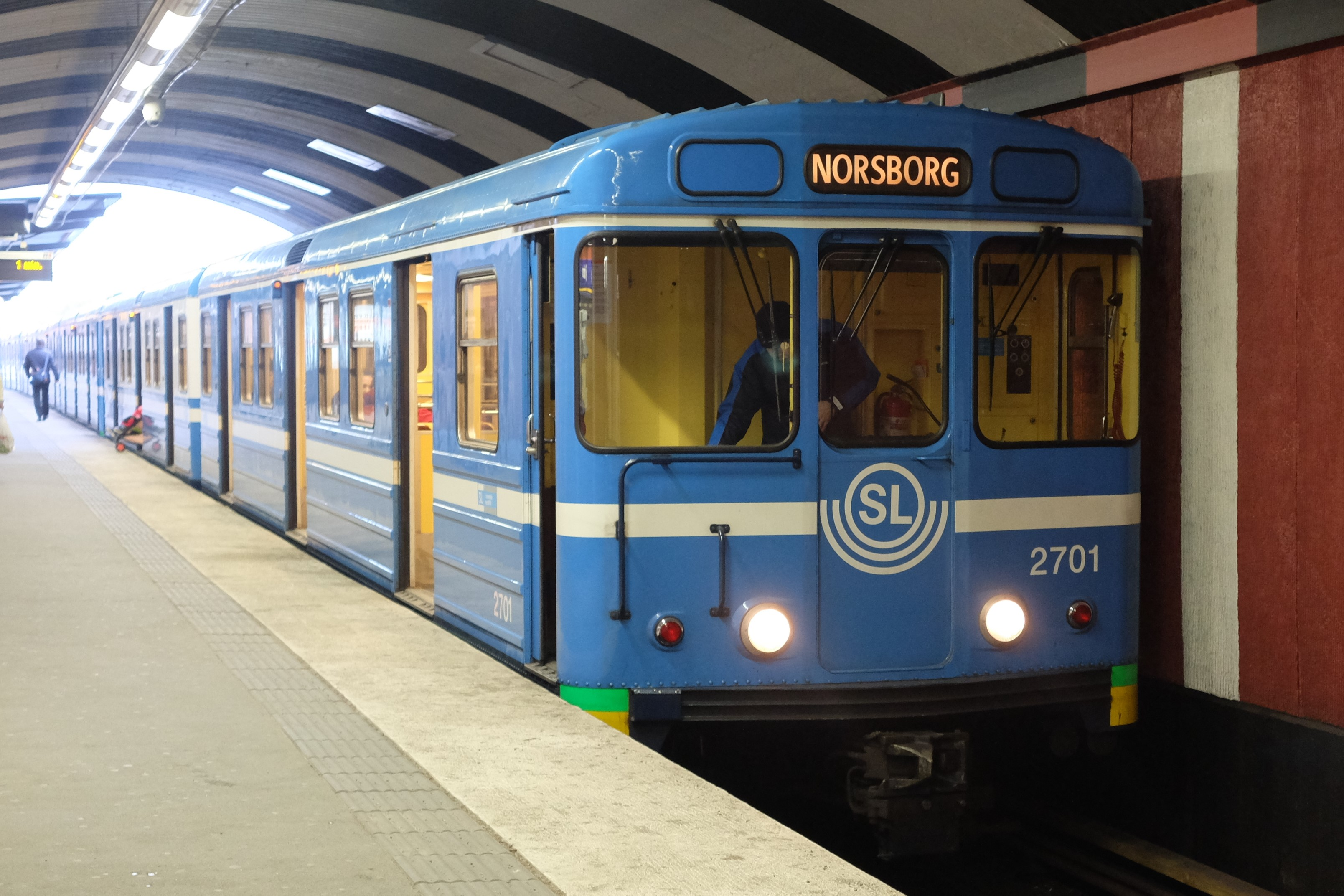 SL C6 2701 på väg mot Norsborg vid Ropsten